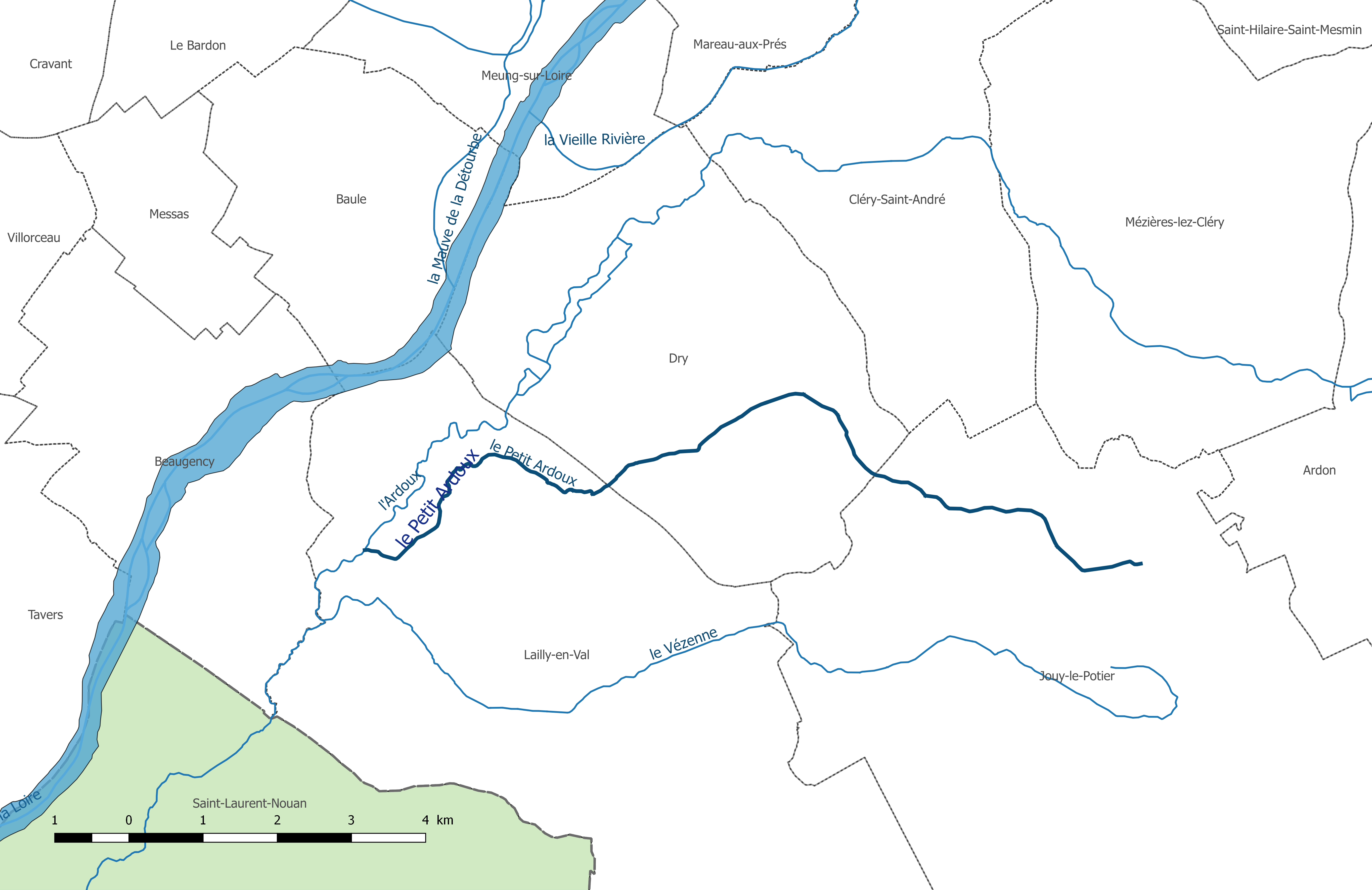 Carte du cours d'eau "le Petit Ardoux", dans le département du Loiret.